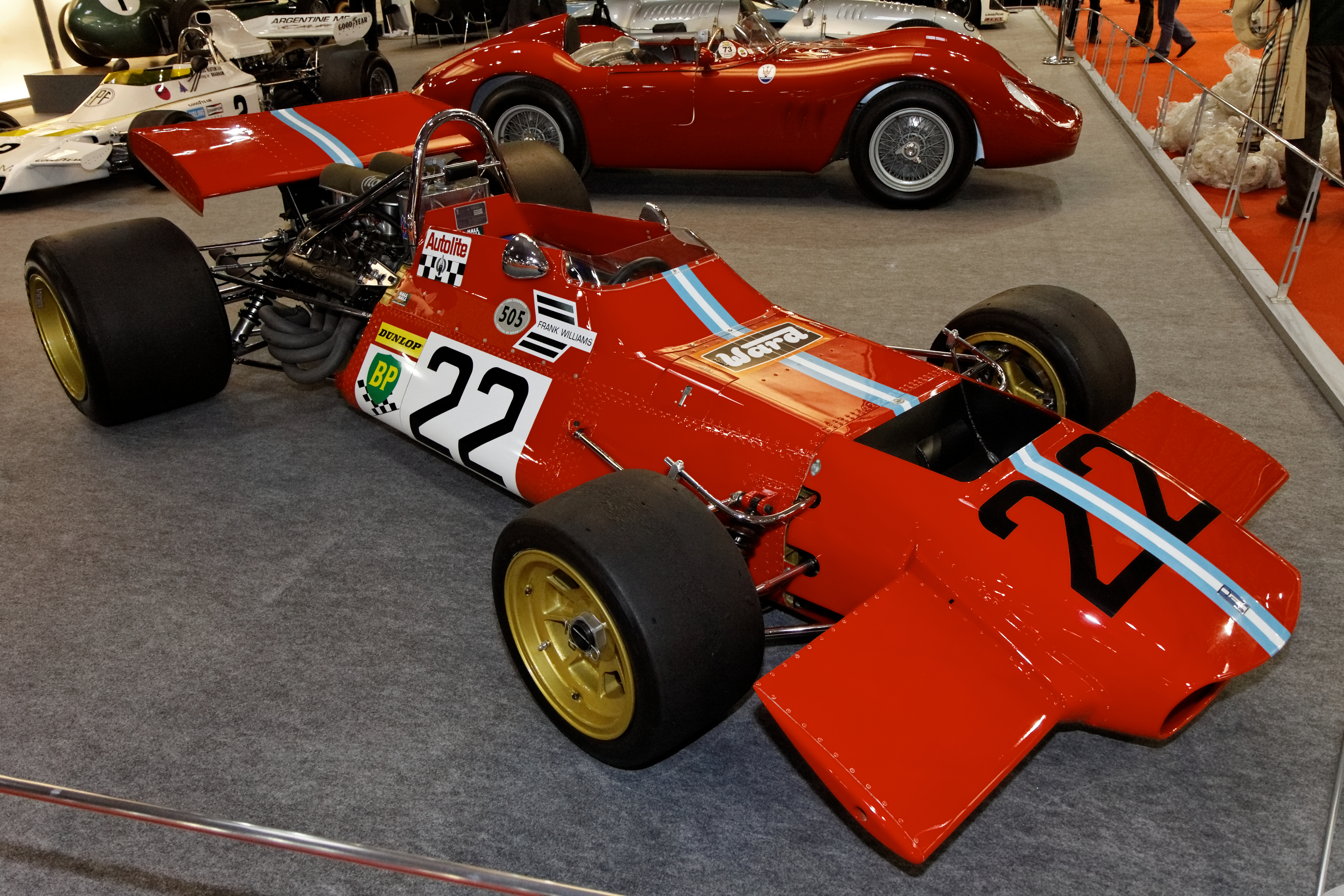 Ferrari 206 SP